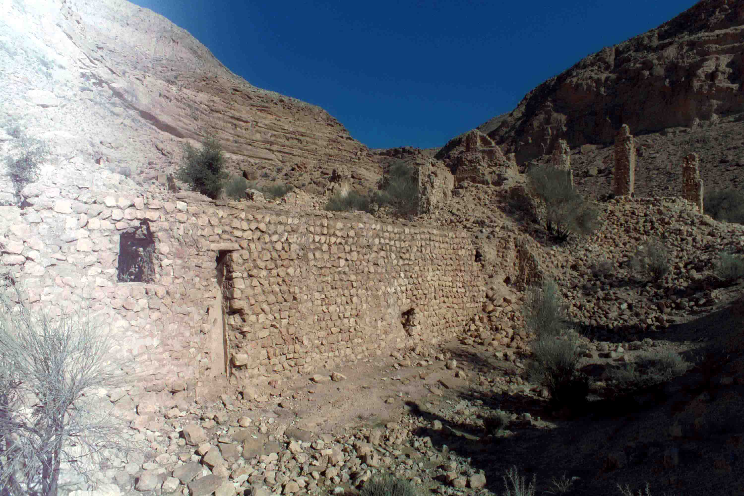 کاخ کيقباد رحمت آباد جویم